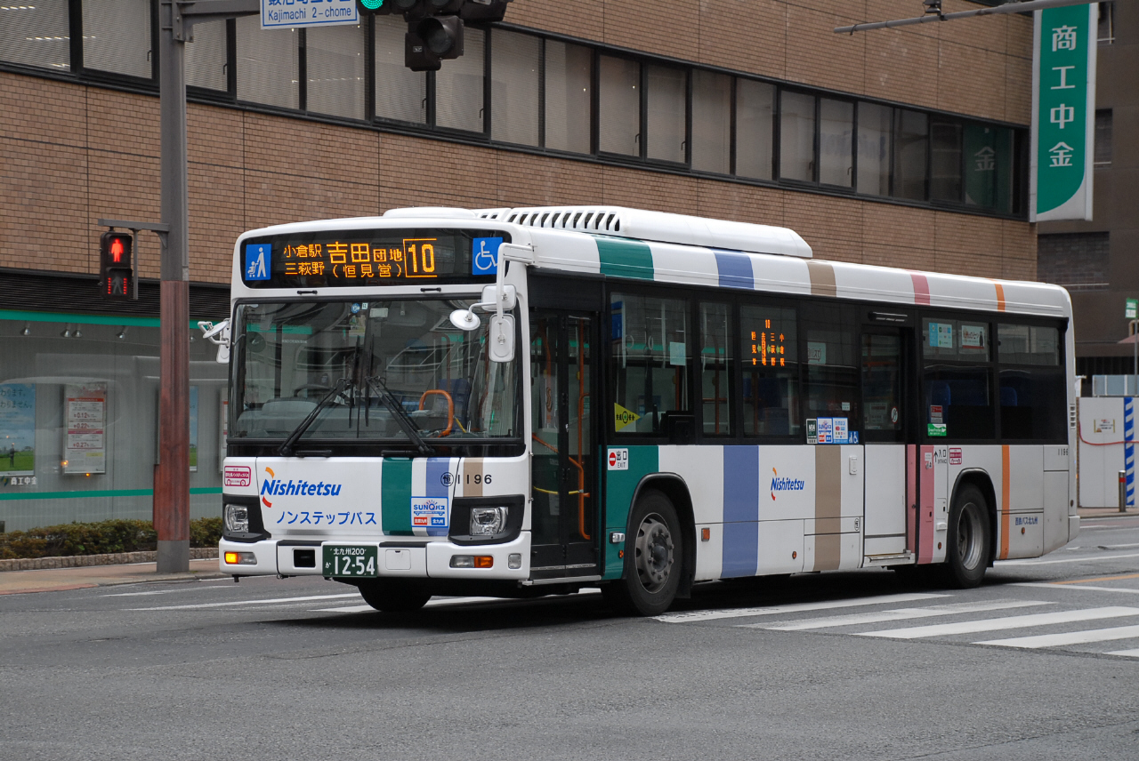 現行路線車両 2019-1-16 鍛冶町交差点にて